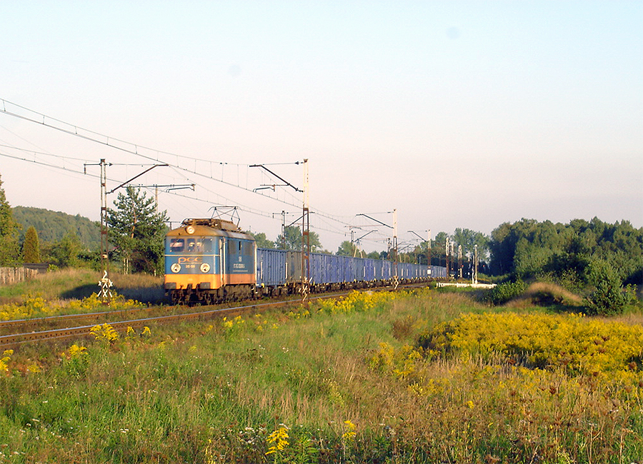 Lokomotywa elektryczna 3E-056 w malowaniu przewoźnika Kopalnia Piasku Szczakowa przejeżdża przez Młoszową koło Trzebini.